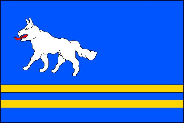 Vlajka obce Václavov u Bruntálu